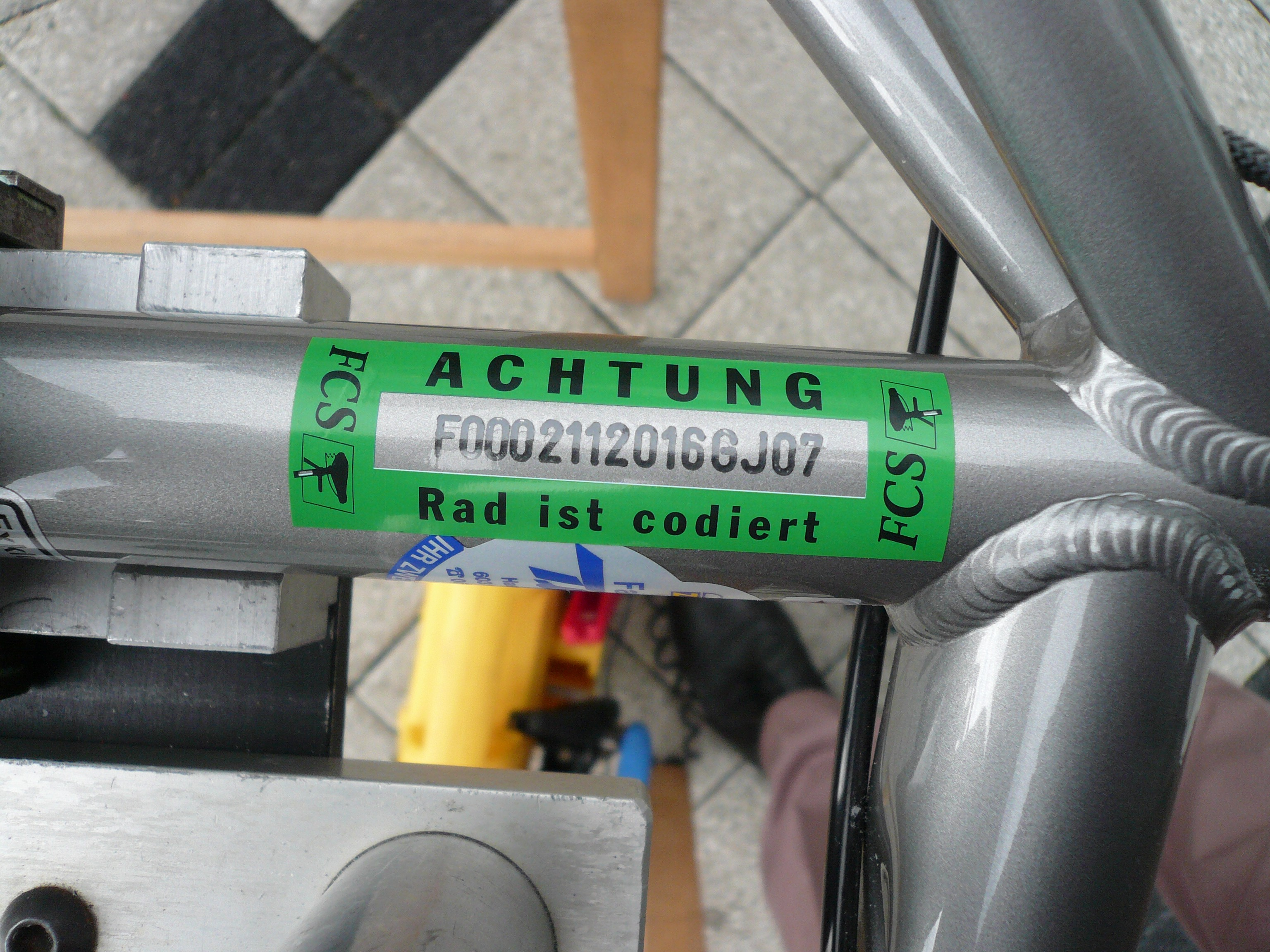 codiertes Rad aus Frankfurt am Main